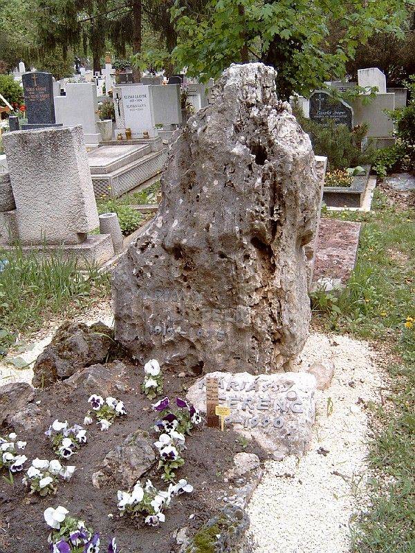 Máriássy Félix (filmrendező, főiskolai tanár, vágó, forgatókönyvíró; a Filmfőiskolák Nemzetközi Szervezetének elnöke, a Magyar Film- és Televízióművészeti Szövetség titkára; Máriássy Judit író férje) 1915-1975 [Kiss Sándor]. Vele: Máriássy Ferenc (fia; operatőr) 1952-1990. Farkasréti temető: 26/1-6-88